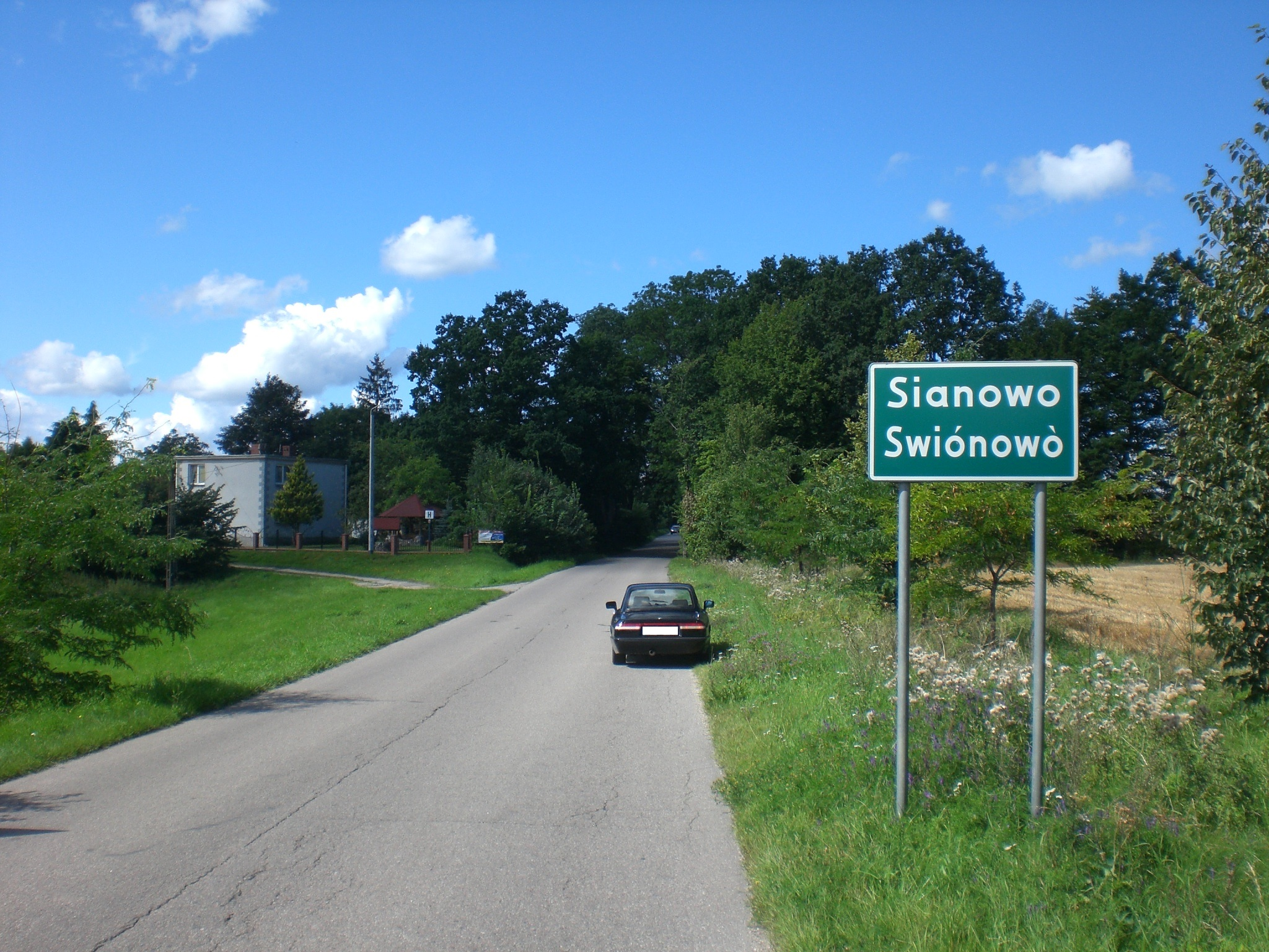 Sianowo